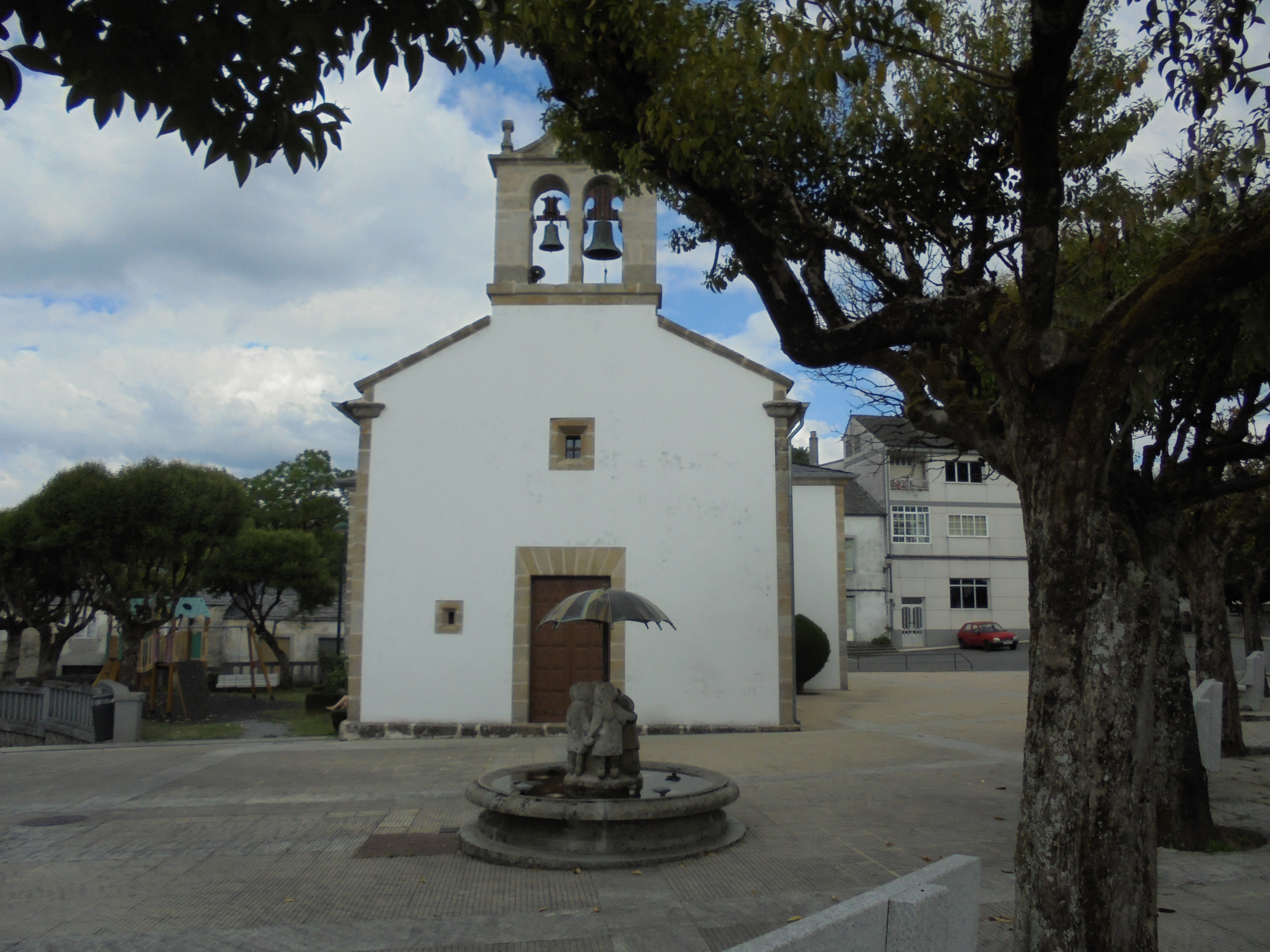 Igrexa parroquial de Santiago de Vilariño ( Castroverde)